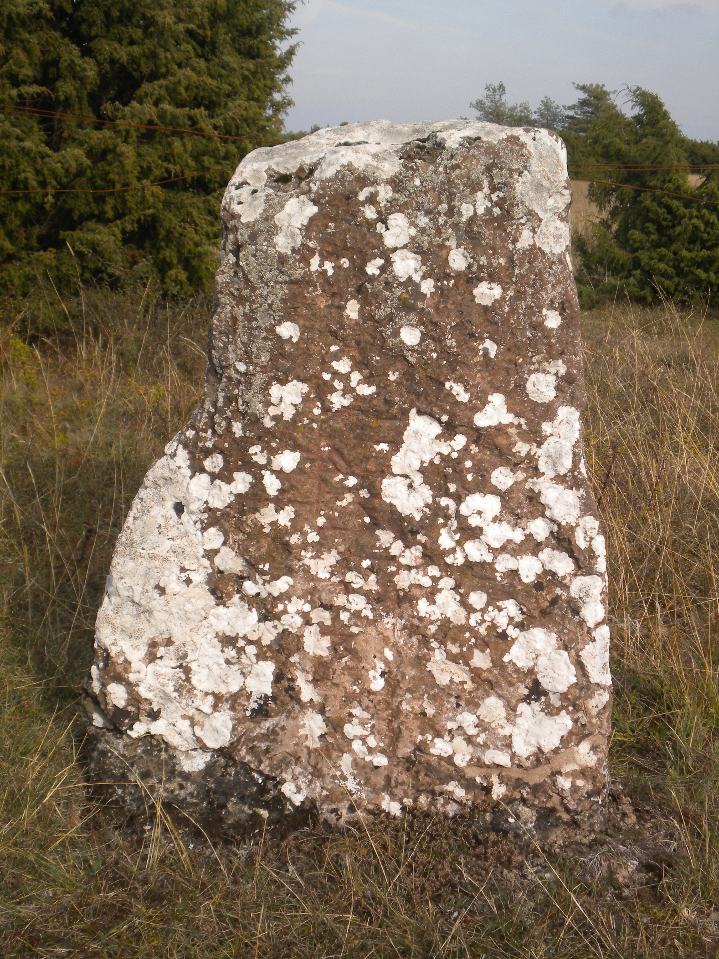 Björnflisan är den enda kända runstenen på alvaret. Den står en bit utanför Dröstorps ödeby.